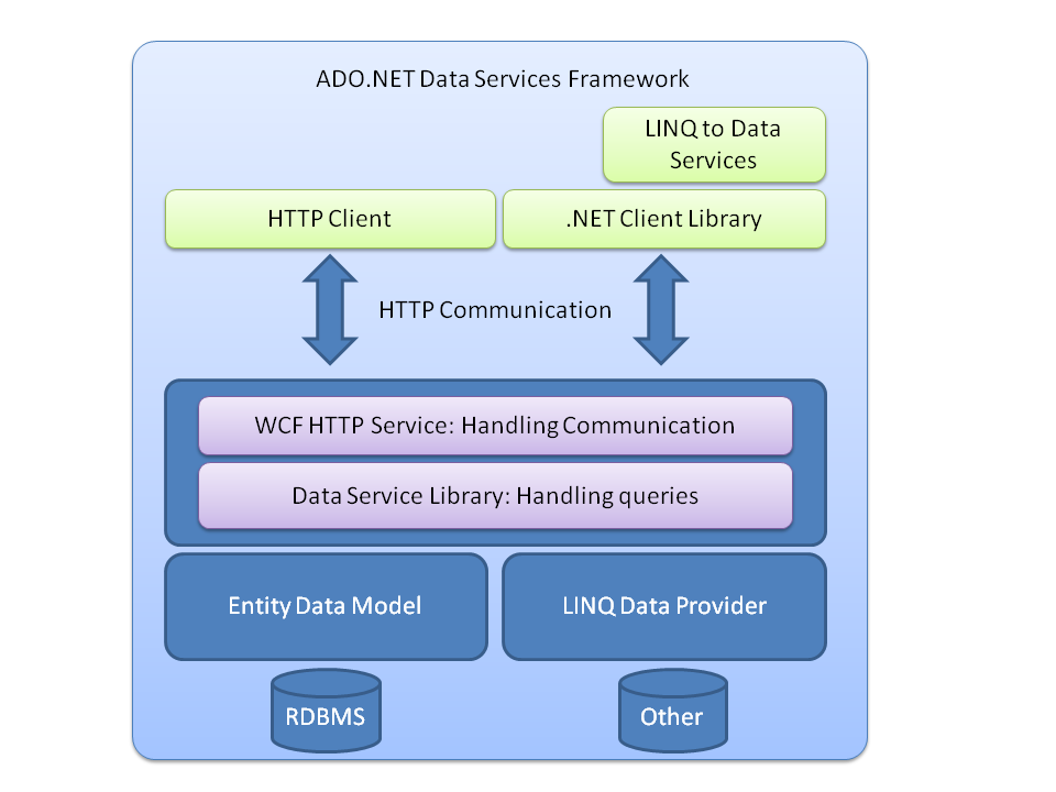 Data Services Framework 架構圖